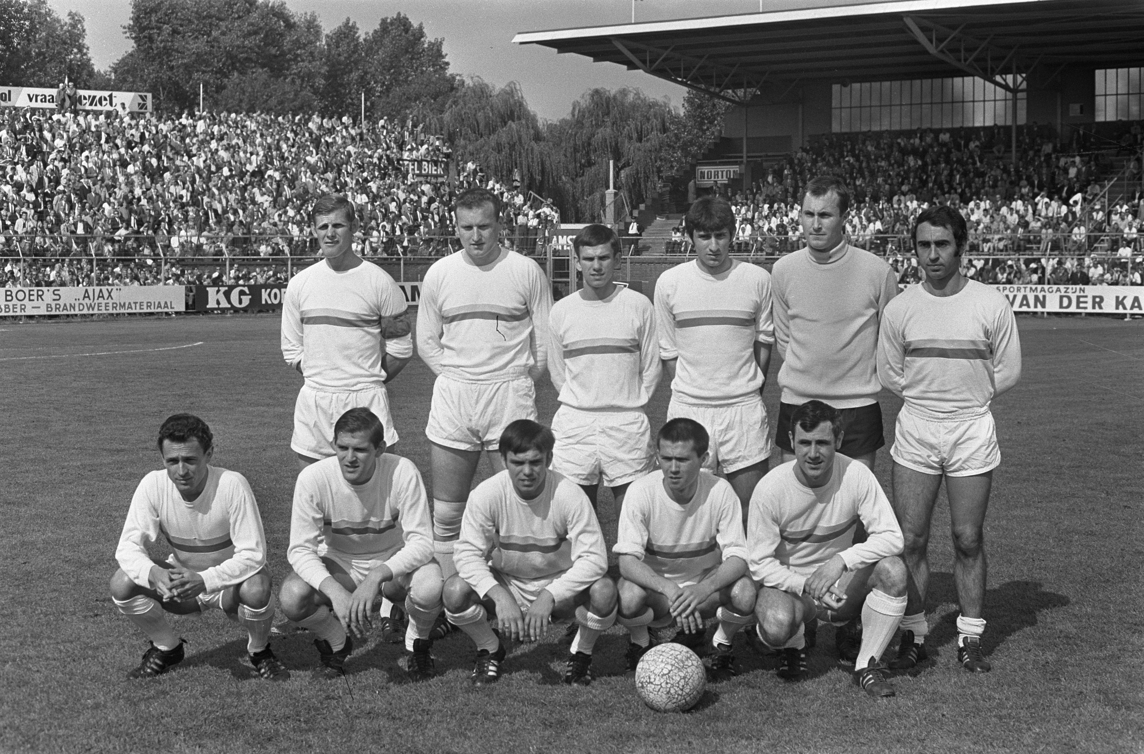 Collectie / Archief : Fotocollectie Anefo Reportage / Serie : Ajax - Fortuna Sittard, 2-0 Beschrijving : Het elftal van Fortuna Sittard Datum : 8 september 1968 Locatie : Amsterdam, Noord-Holland Trefwoorden : elftallen, groepsportretten, sport, voetbal Fotograaf : Fotograaf Onbekend / Anefo Auteursrechthebbende : Nationaal Archief Materiaalsoort : Negatief (zwart/wit) Nummer archiefinventaris : bekijk toegang 2.24.01.05 Bestanddeelnummer : 921-6612